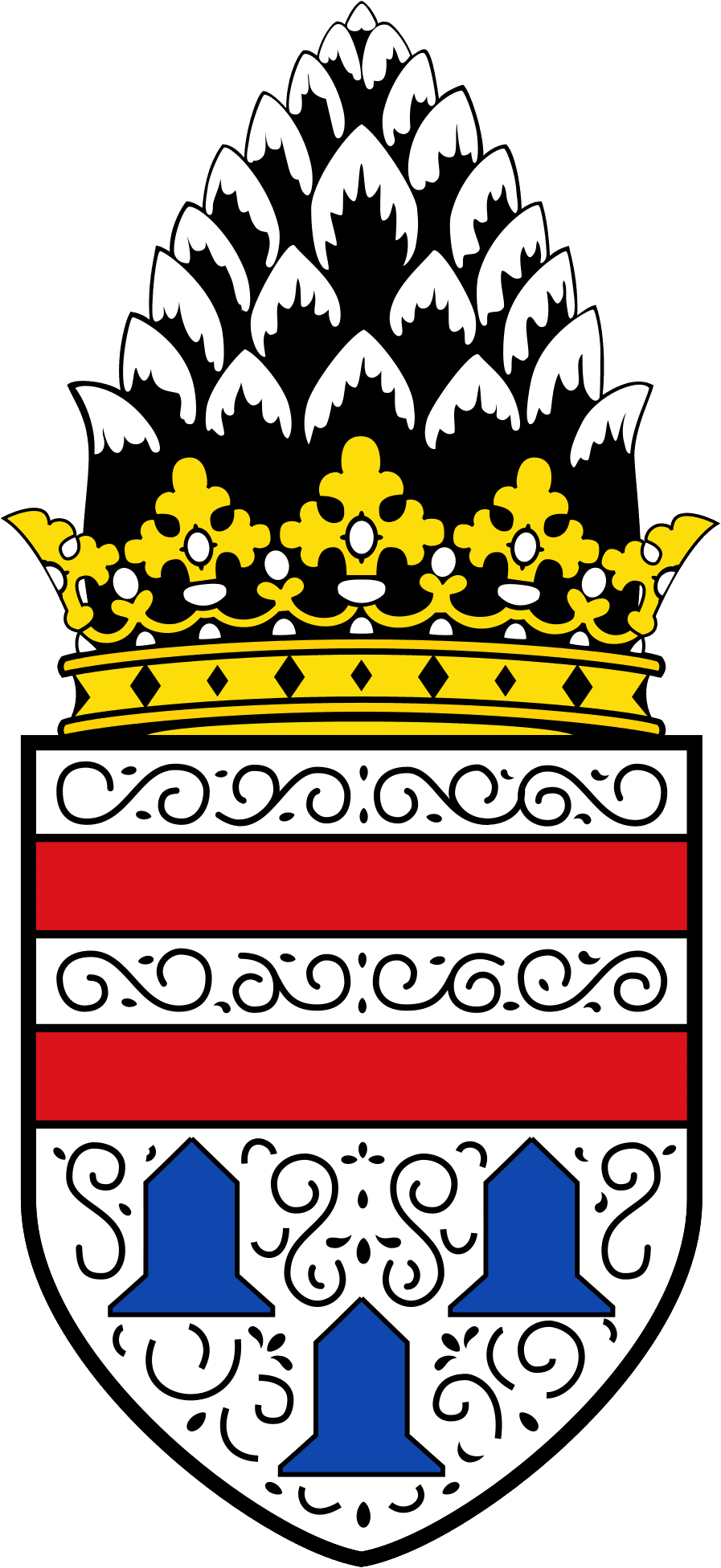 Wappen von Kronberg im Taunus